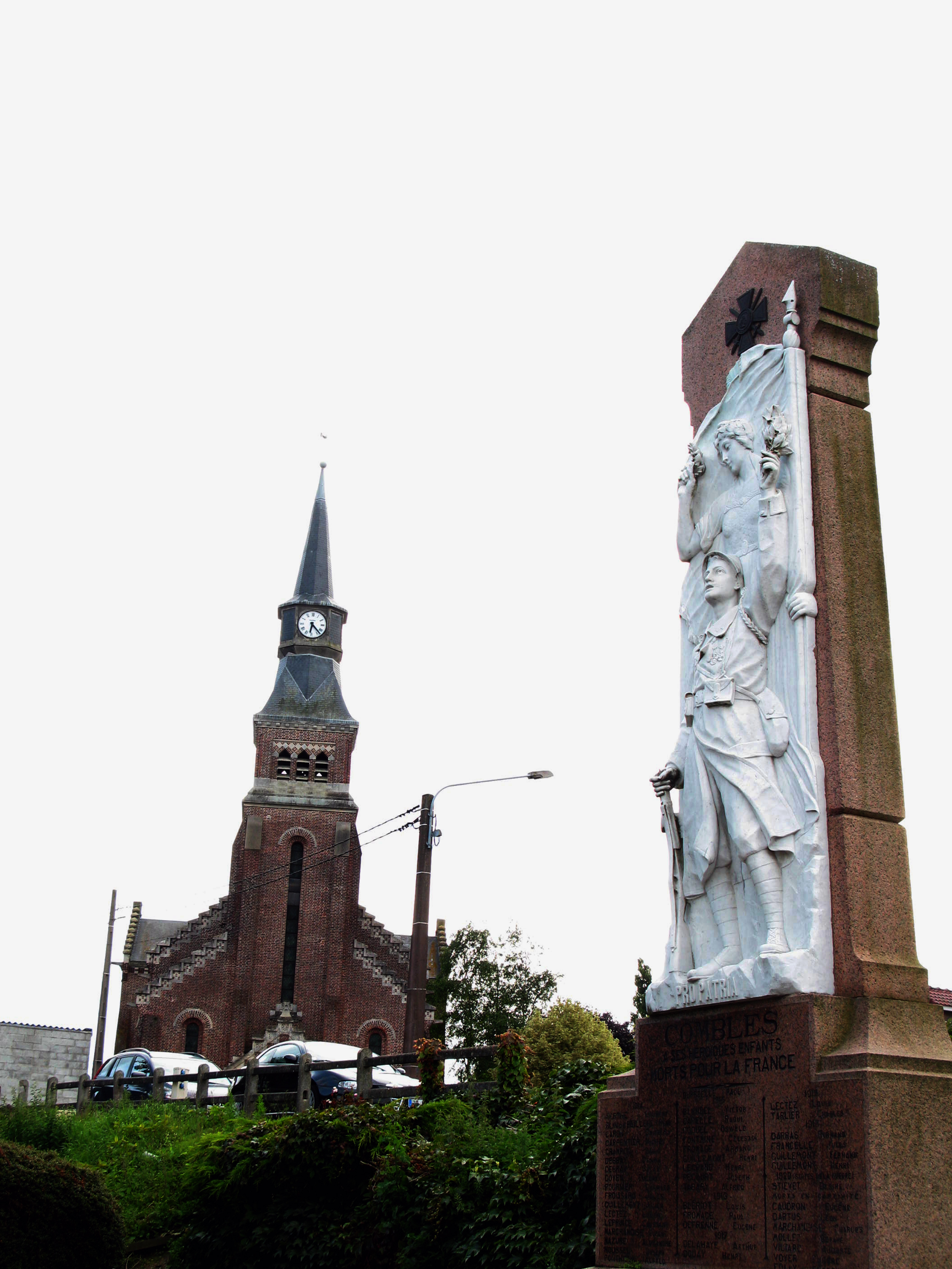 Combles (Somme, France) - L'église et le monument-aux-morts.